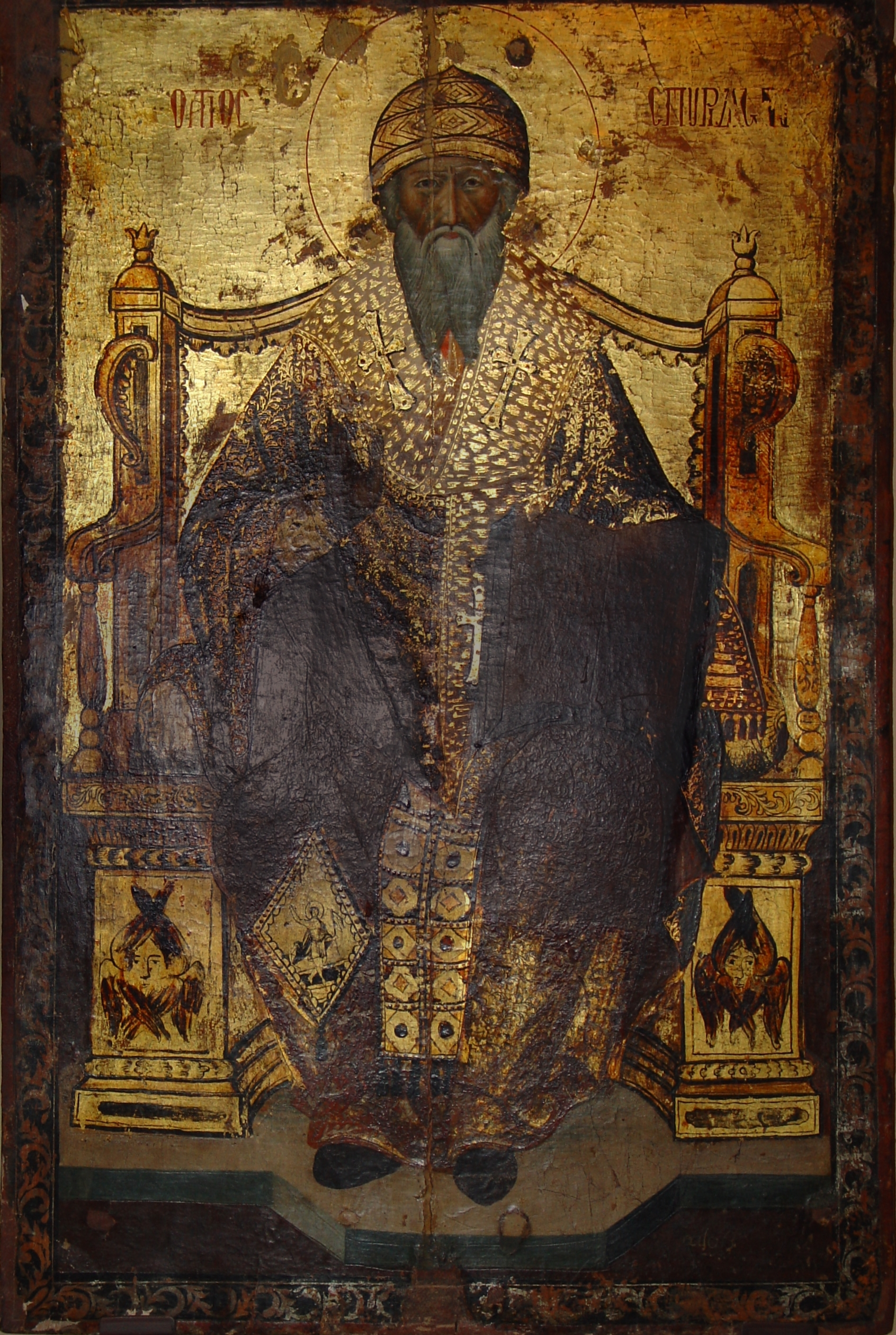 Икона на Свети Спиридон във Варненския археологически музей